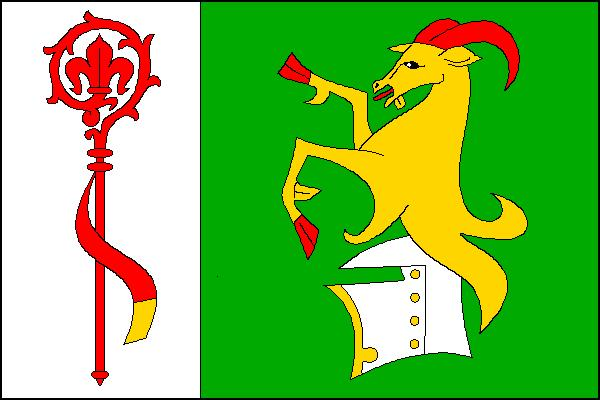 Vlajka obce Dolní Stakory